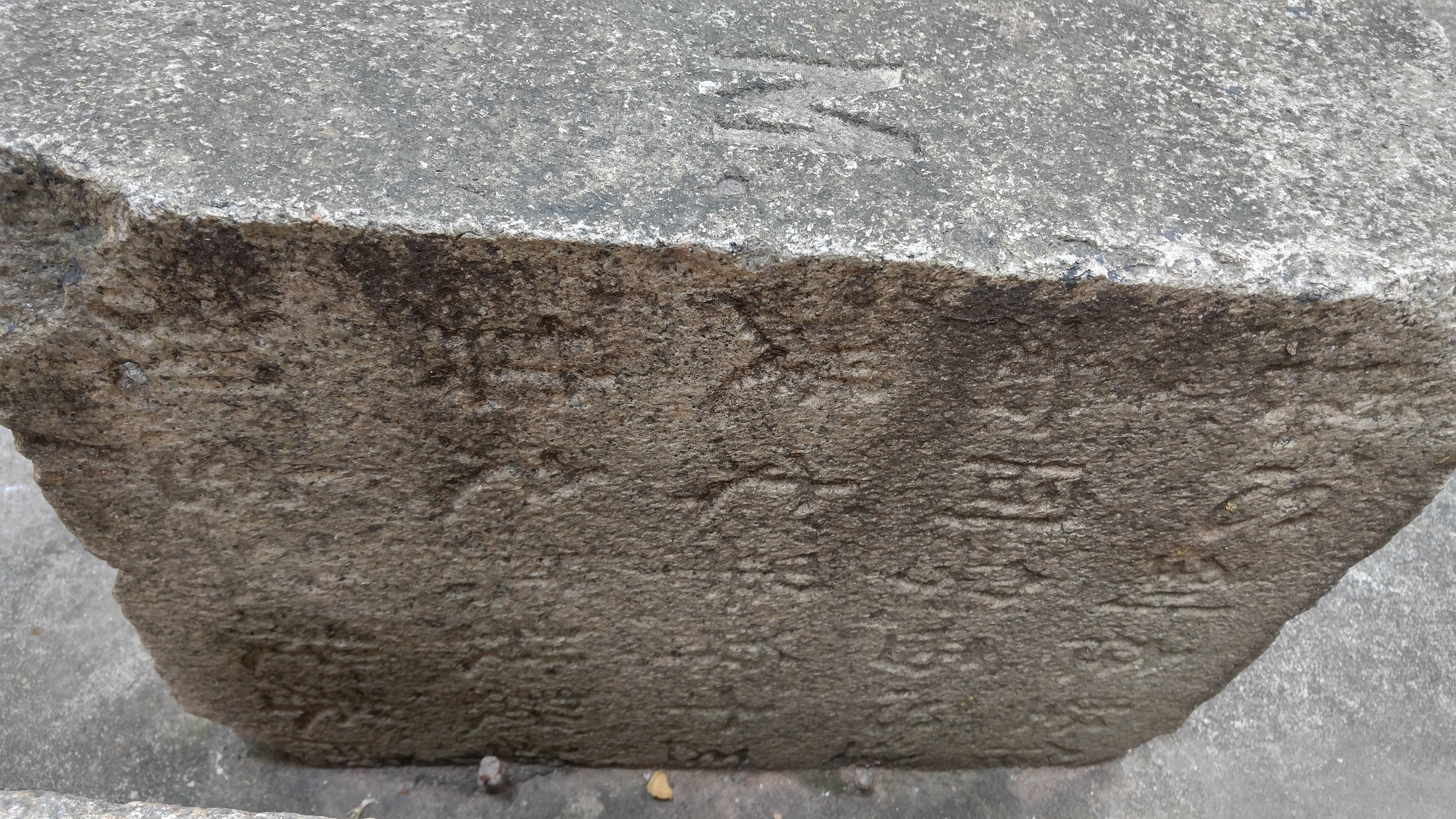 A part of the headstone of Mrs. Lizzie B. Hager had been left behind at the roadside when the cemetery was removed/relocated. It has recently been reunited with its tomb base.